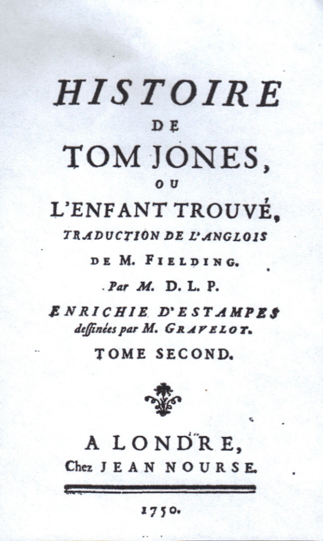 Page de titre du deuxième volume de la première traduction de l'Histoire de Tom Jones en français, contenant les livres 8 à 12.